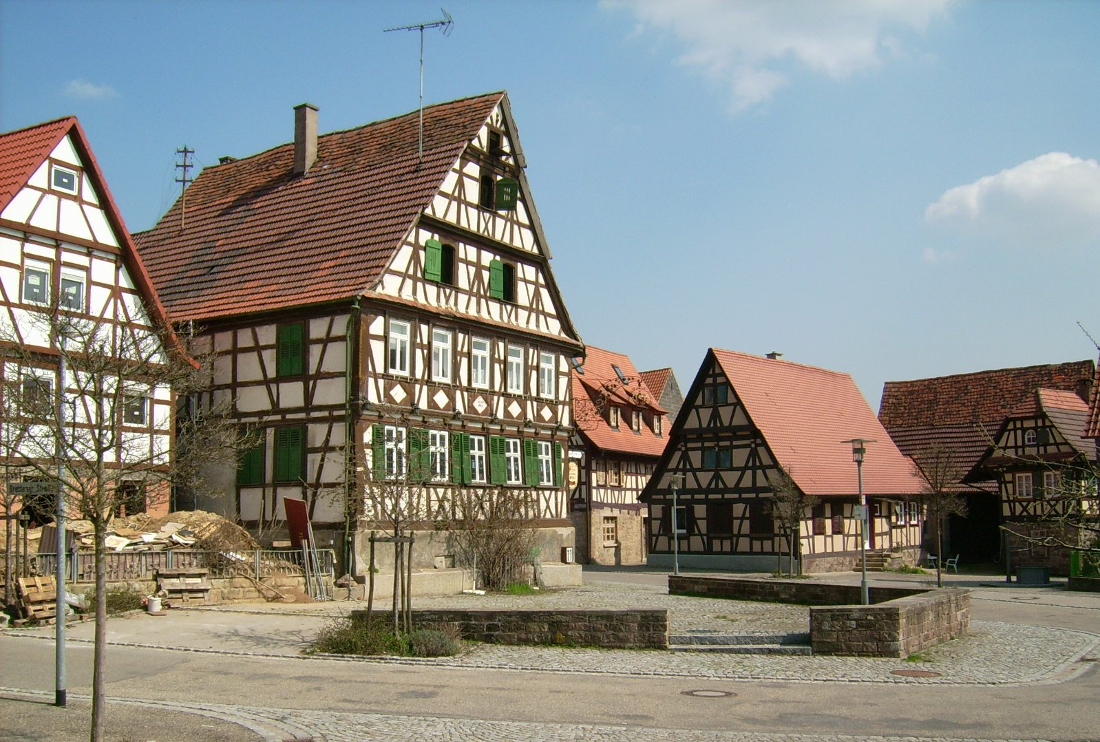 Zaisersweiher Germany market place Marktplatz